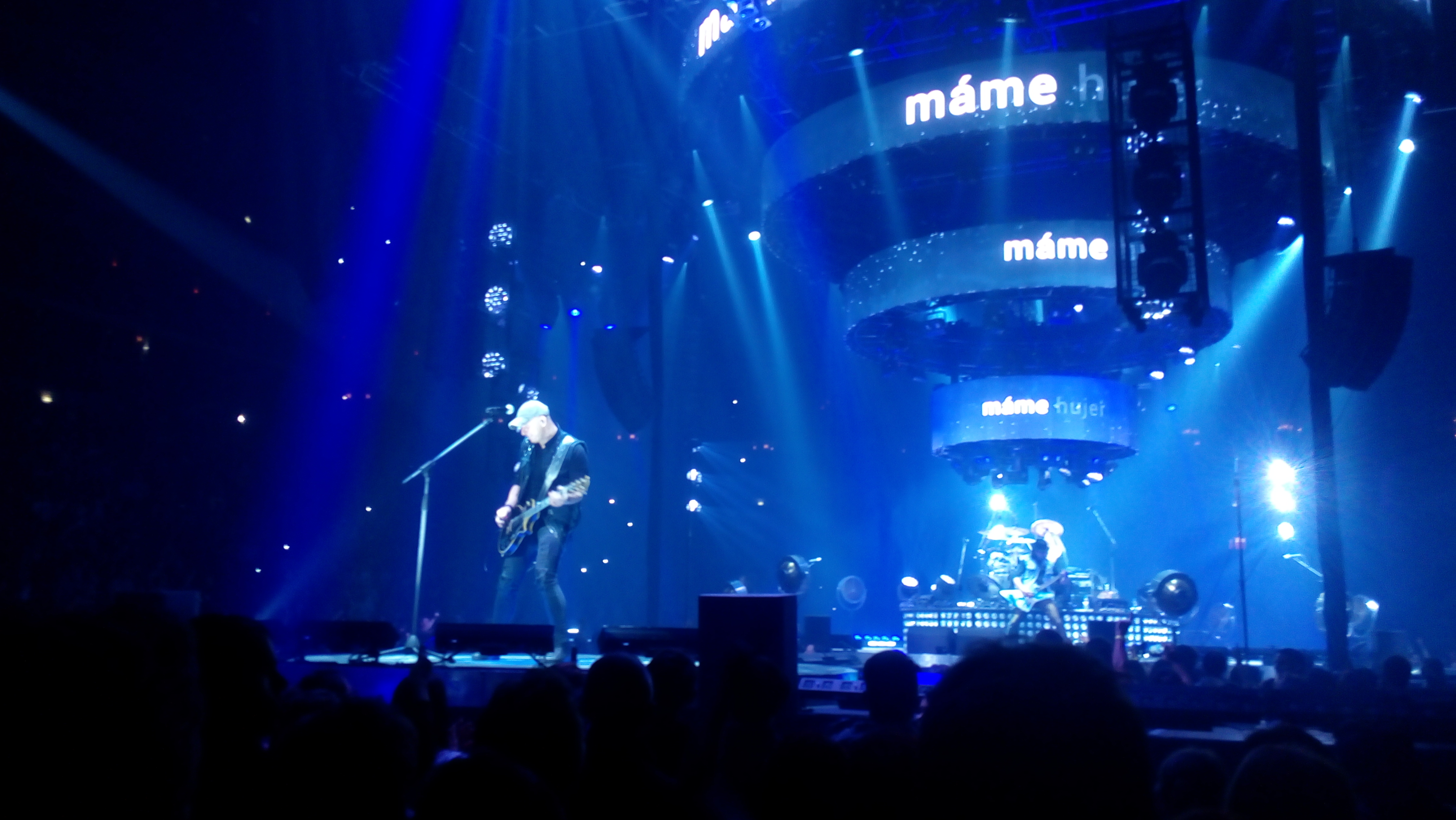 Skupina Kabát během vyprodaného koncertu v pražské O2 areně 28. 11. 2017